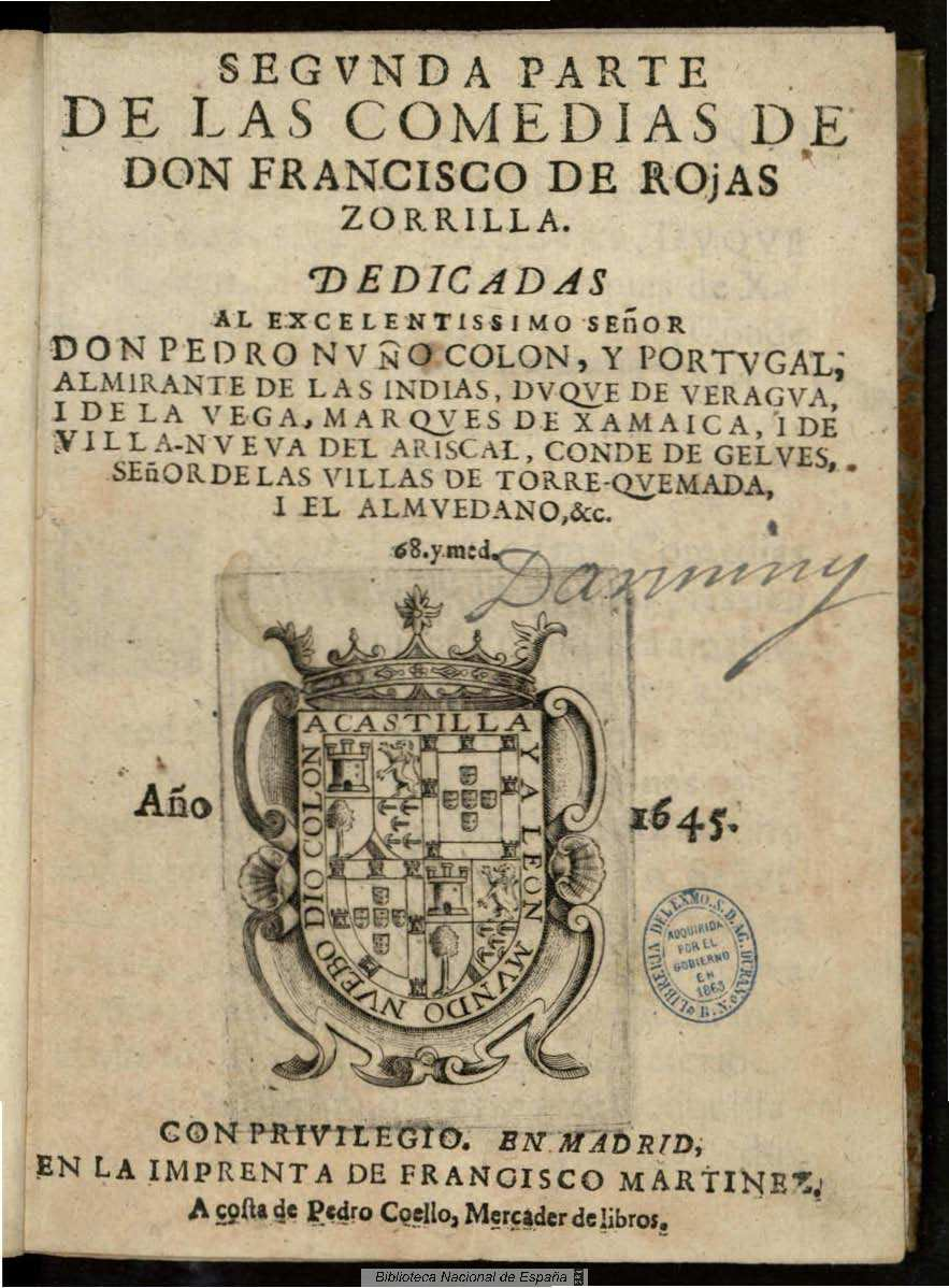 Segunda parte de las comedias de Don Francisco de Rojas Zorrilla ... Autor: Rojas Zorrilla, Francisco de (1607-1648) Fecha: 1645 Datos de edición: En Madrid en la Imprenta de Francisco Martinez a costa de Pedro Coello ... Contenido: Lo que son mugeres, (h. 1-20v.) ; Los vandos de Berona, (h. 21-42v.) ; Entre bobos anda el juego, 8h. 43-63v.) ; Sin honra no ay amistad, (h. 64-88) ; Nuestra Señora de Atocha, (h. 88v-112) ; Abrir el ojo, (h. 112v-131) ; Los trabajos de Tobias (h. 131v-153v) ; Los encantos de Medea, (h. 154-169) ; Los tres blasones de España, (h. 169v-194v) ; Los aspides de Cleopatra, (h. 195-218v) ; Lo que queria ver el Marques de Villena, (h. 219-245) ; El mas impropio verdugo, por las mas justa vengança, (h.245v-259v)Lo que son mugeres, h. 1-20v ; Los vandos de Berona, h. 21-42v ; Entre bobos anda el juego, h. 43-63v ; Sin onra no hay amistad, h. 64-88 ; Nuestra Señora de Atocha, h. 88v-112 ; Abrir el ojo, h. 112v-131 ; Los trabajos de Tobias h. 131v-153v ; Los encantos de Medea, h. 154-169 ; Los tres blasones de España, h. 169v-194v ; Los aspides de Cleopatra, h. 195-218v ; Lo que queria ver el Marques de Villena, h. 219-245 ; El mas impropio verdugo, por las mas justa vengança, h.245v-259v